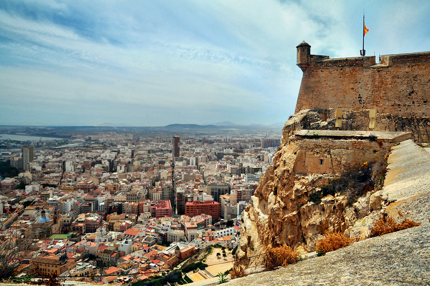 Вид на крепость Санта-Барбара, Аликанте, Испания